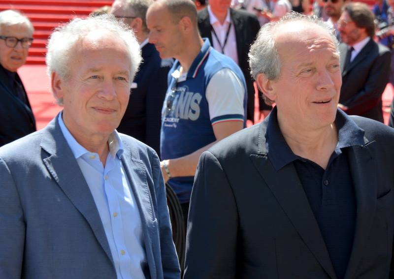 Les frères Dardenne (à gauche, Jean-Pierre Dardenne ; à droite Luc Dardenne) au festival de Cannes